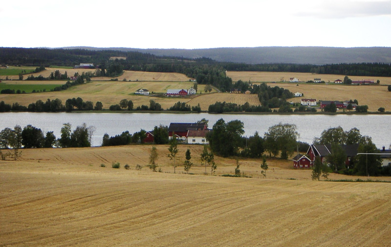 Einavannet